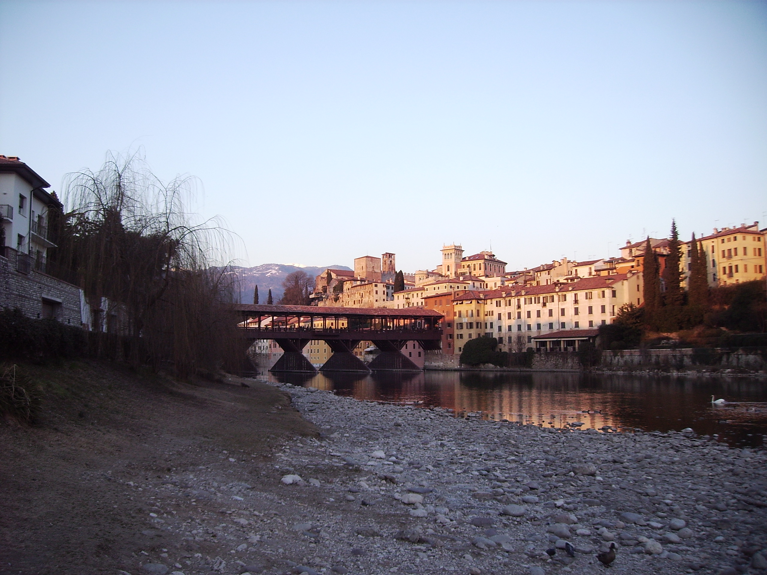 Bassano del Grappa (Vicenza, Italy)